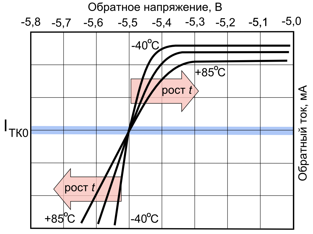 Точка нулевого ТКН в стабилитроне с нормально положительным ТКН.